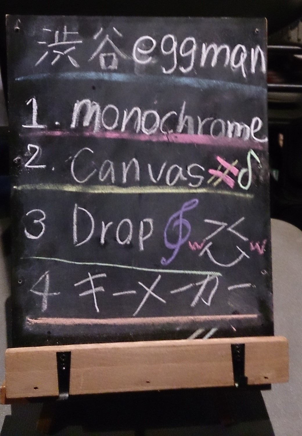 amiinaセトリボード(20150207(1))